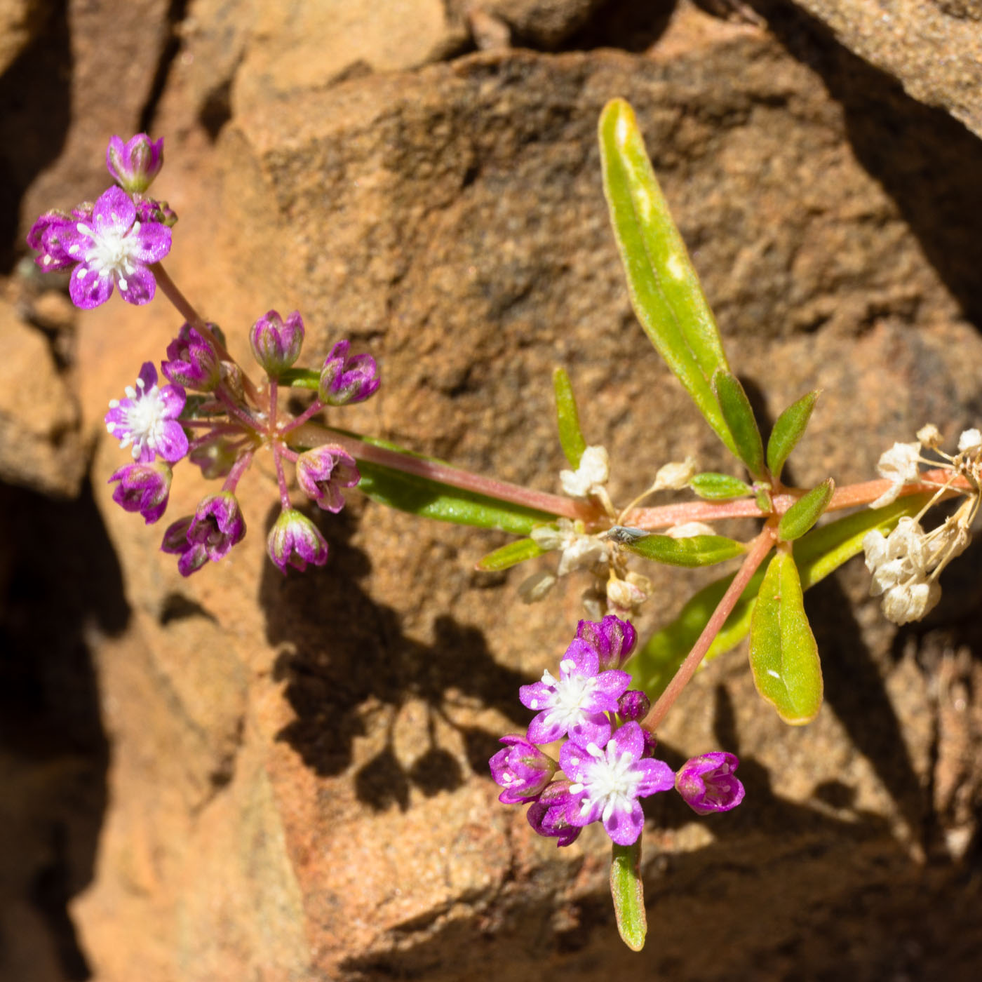 Gisekia africana-0292